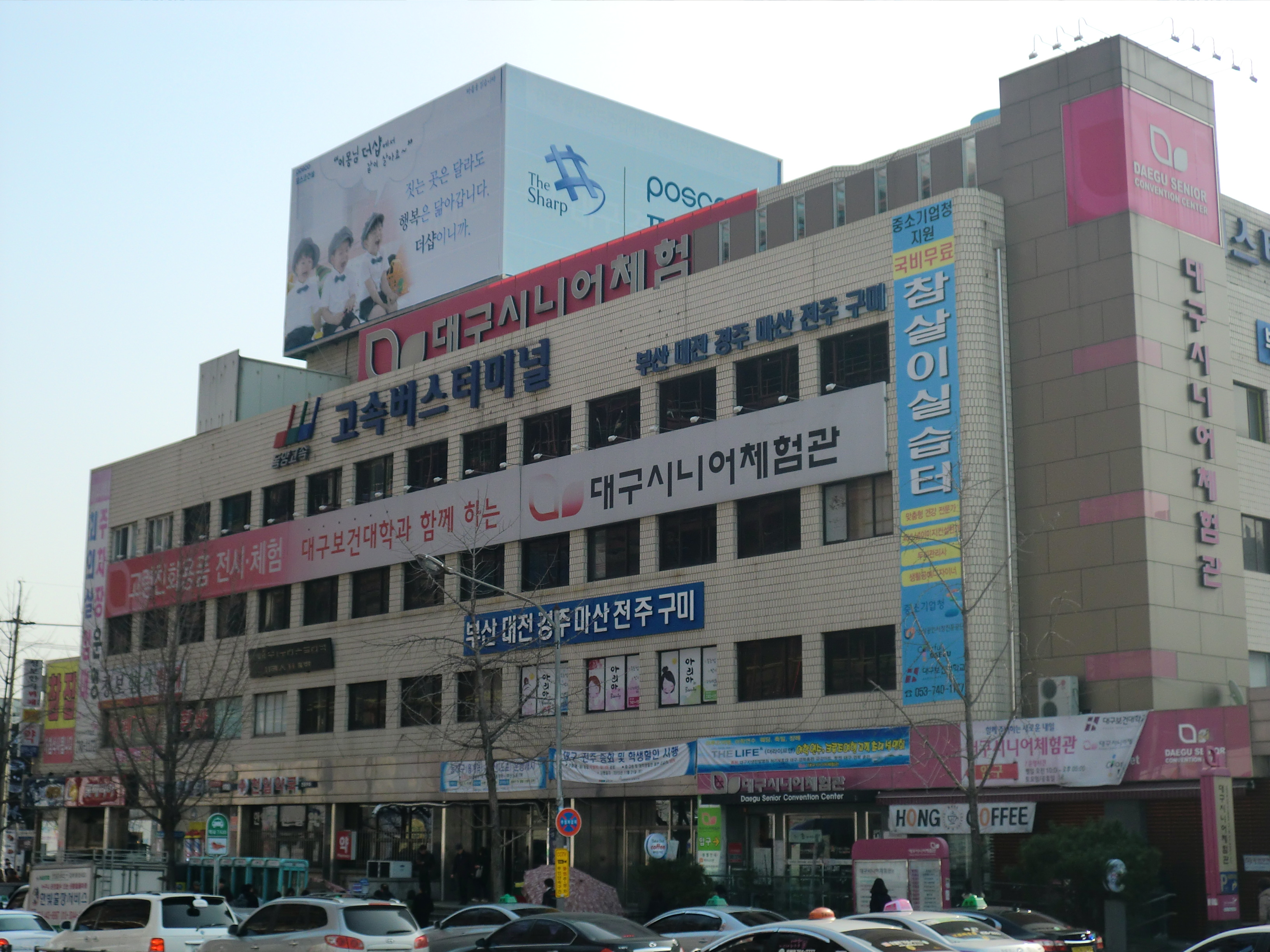 동양고속 고속버스터미널